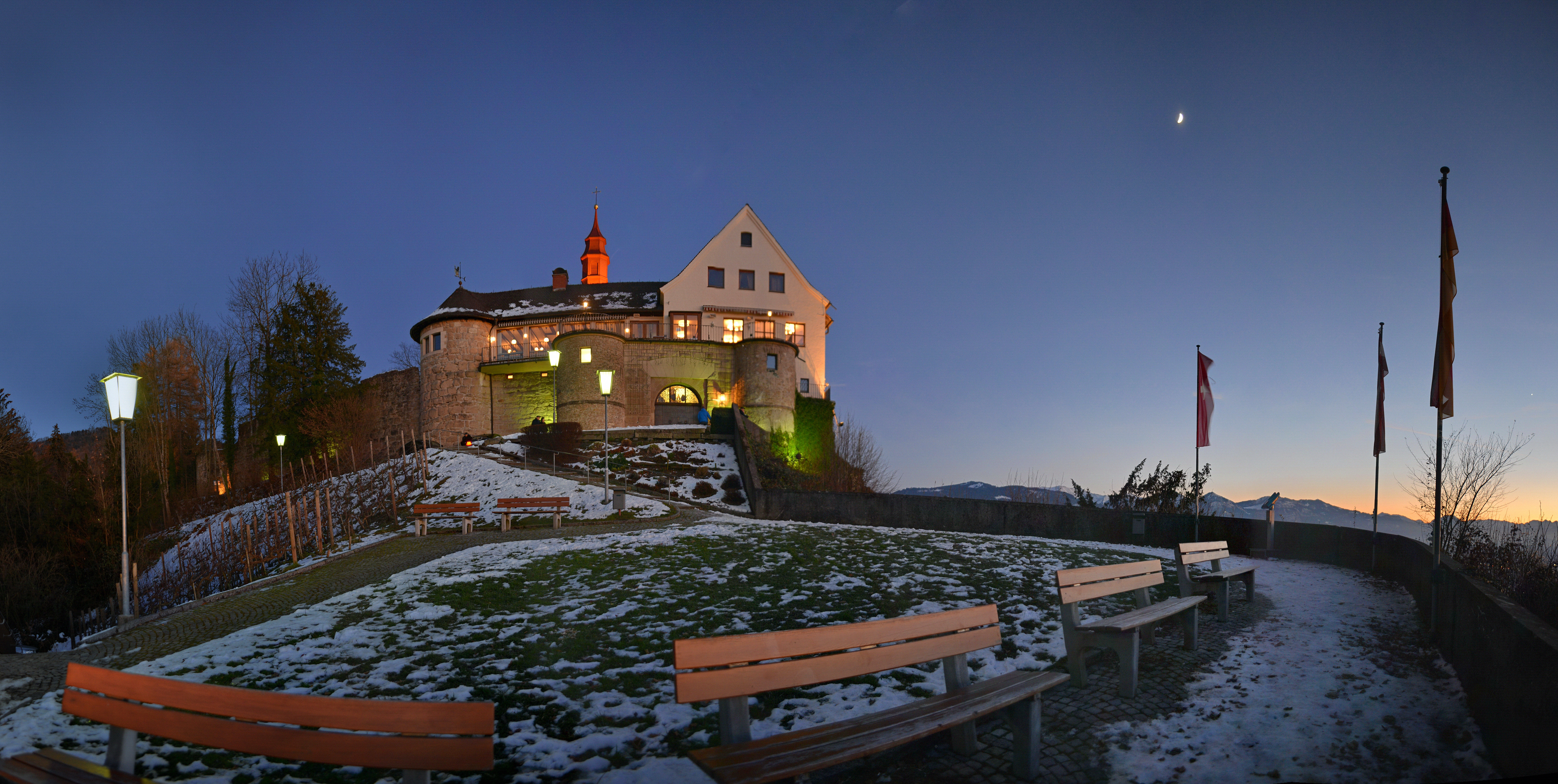 Die Burg Hohenbregenz ist eine hochmittelalterliche Burgruine und liegt auf dem Gebhardsberg bei Bregenz.